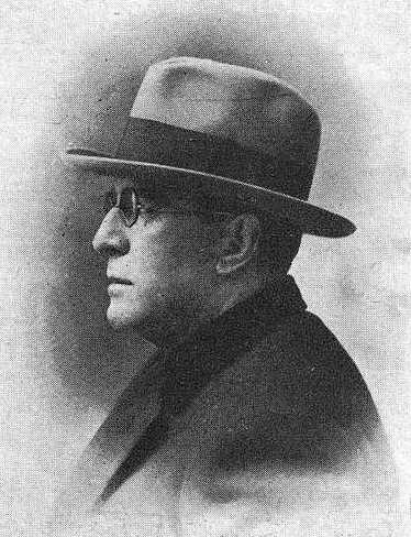 Xavier Prado Rodríguez (Prado Lameiro), fotografía en Vida Gallega 1931